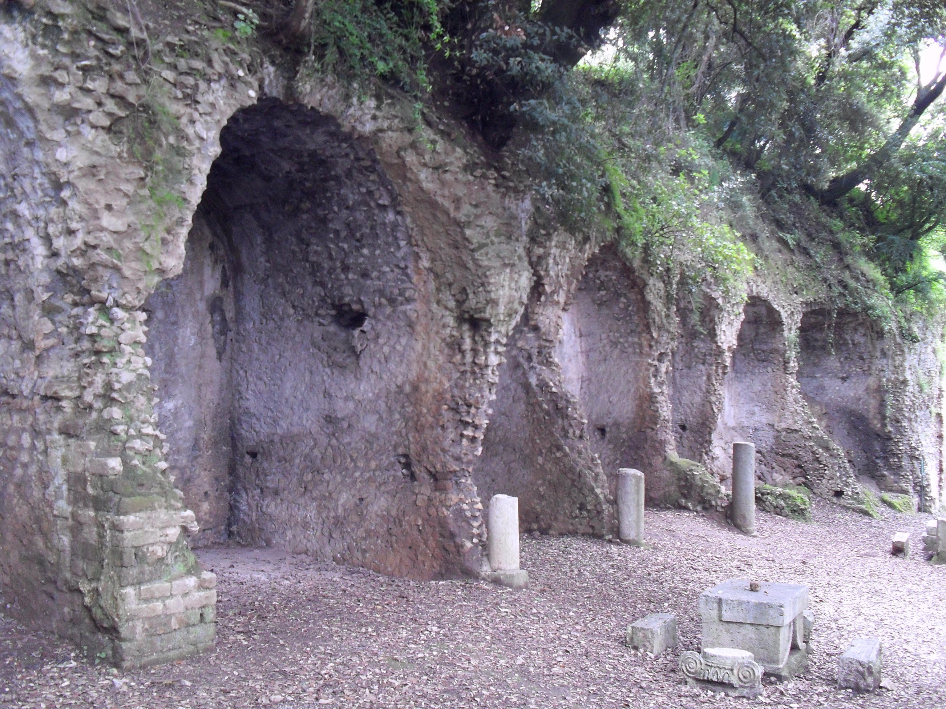 Villa romana Manlio Vopisco (Tivoli, villa Gregoriana)